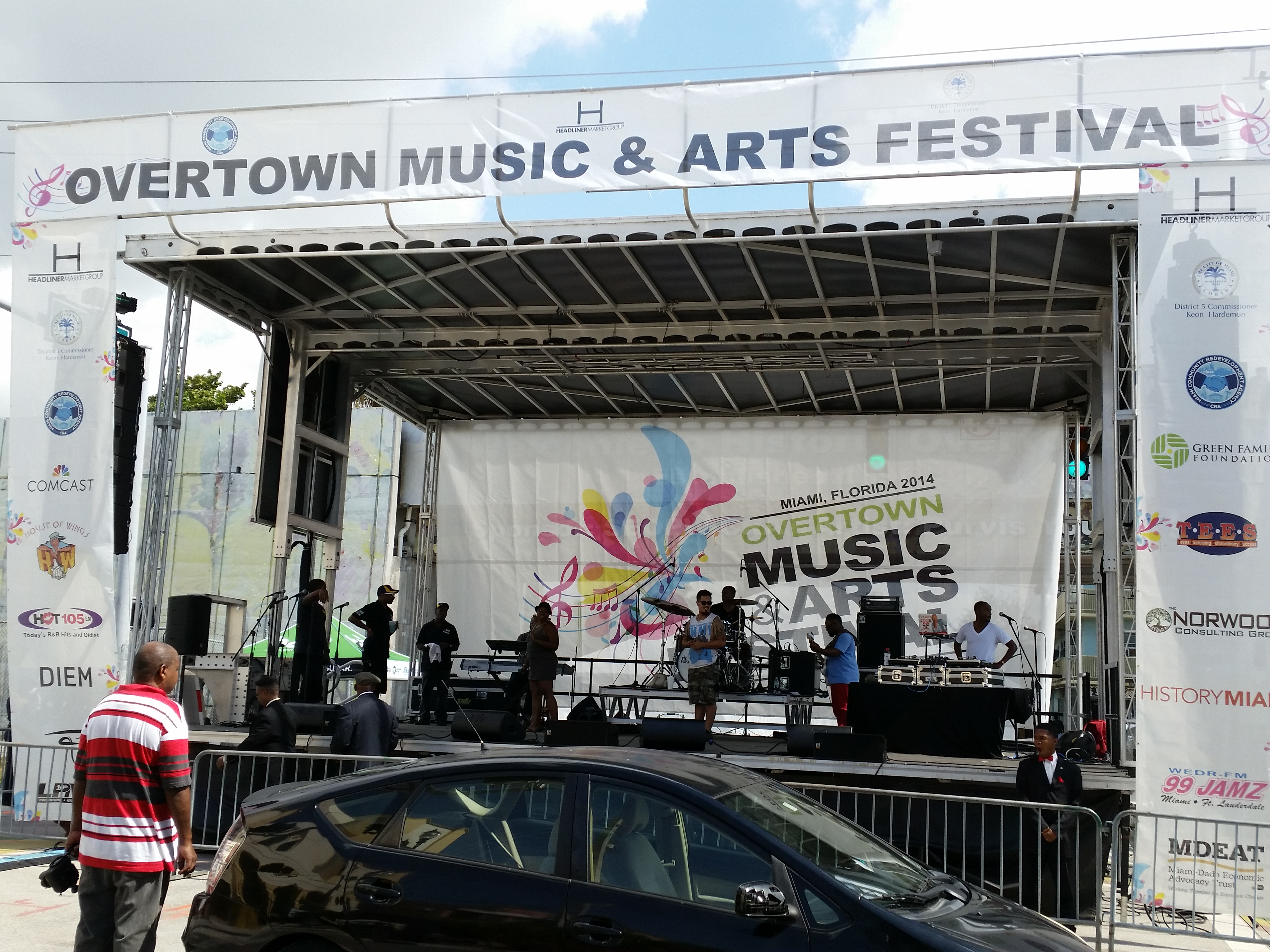 Miami FL: Overtown Music and Art Festival stage